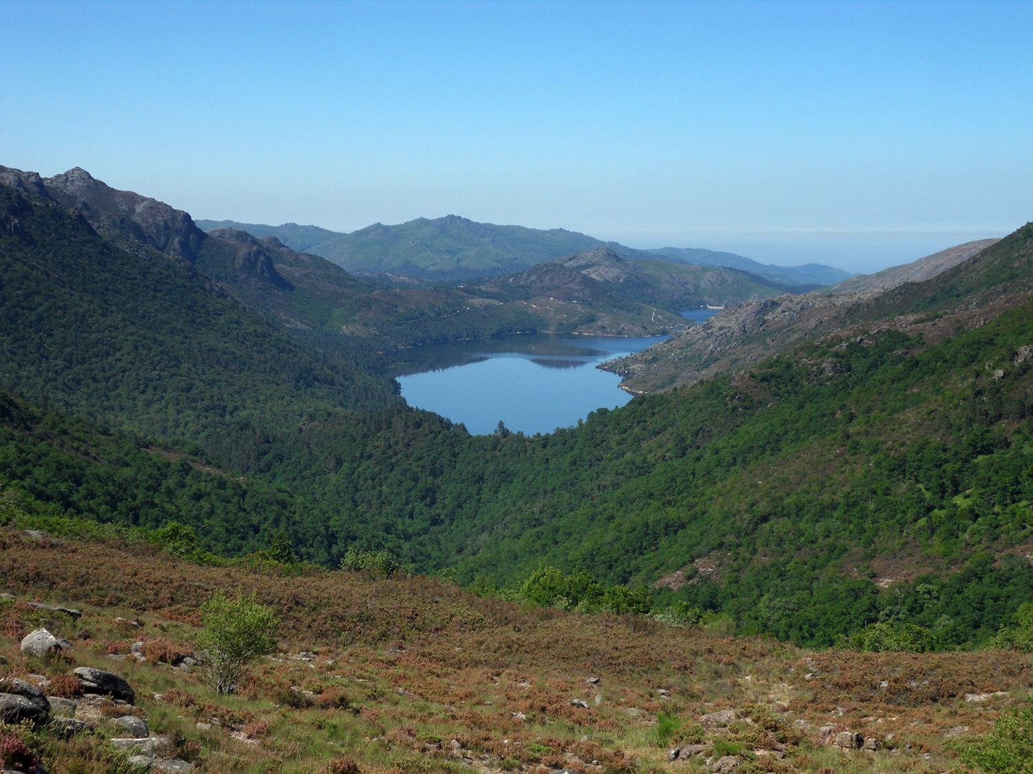 Paisagem sobre a Reserva, do lado português